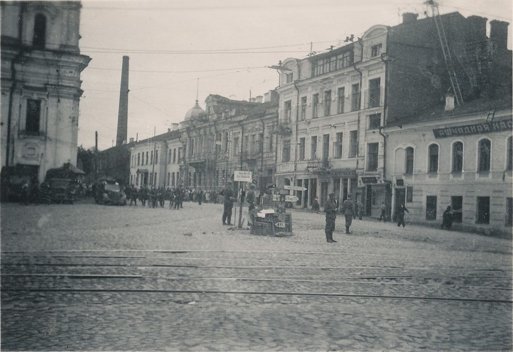 Беларуская (тарашкевіца): Віцебск (Viciebsk), рог вуліцаў Вялікай (vulica Vialikaja) і Задунаўскай (vulica Zadunaŭskaja)